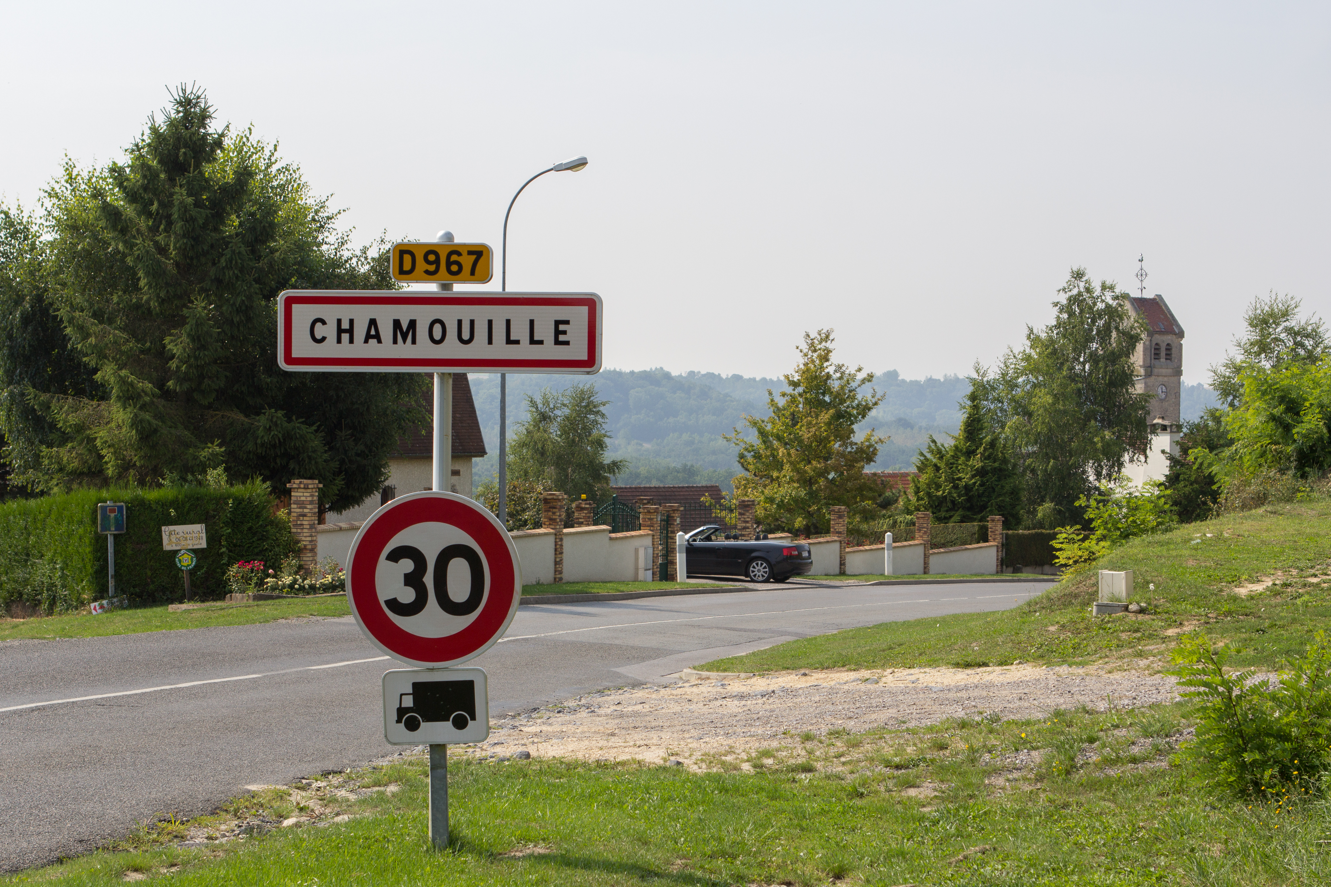 Vue de Chamouille, Aisne, France / (entrée nord de chamouille, D967, en venant de Monthenault)